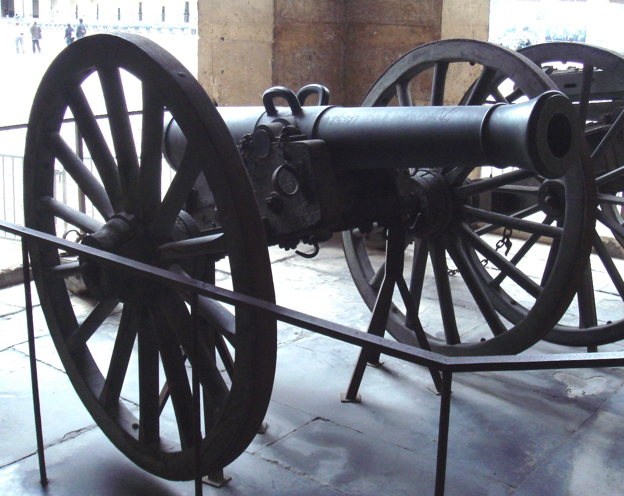 Canon_Obusier_Le_Lassaigne, modele 1853